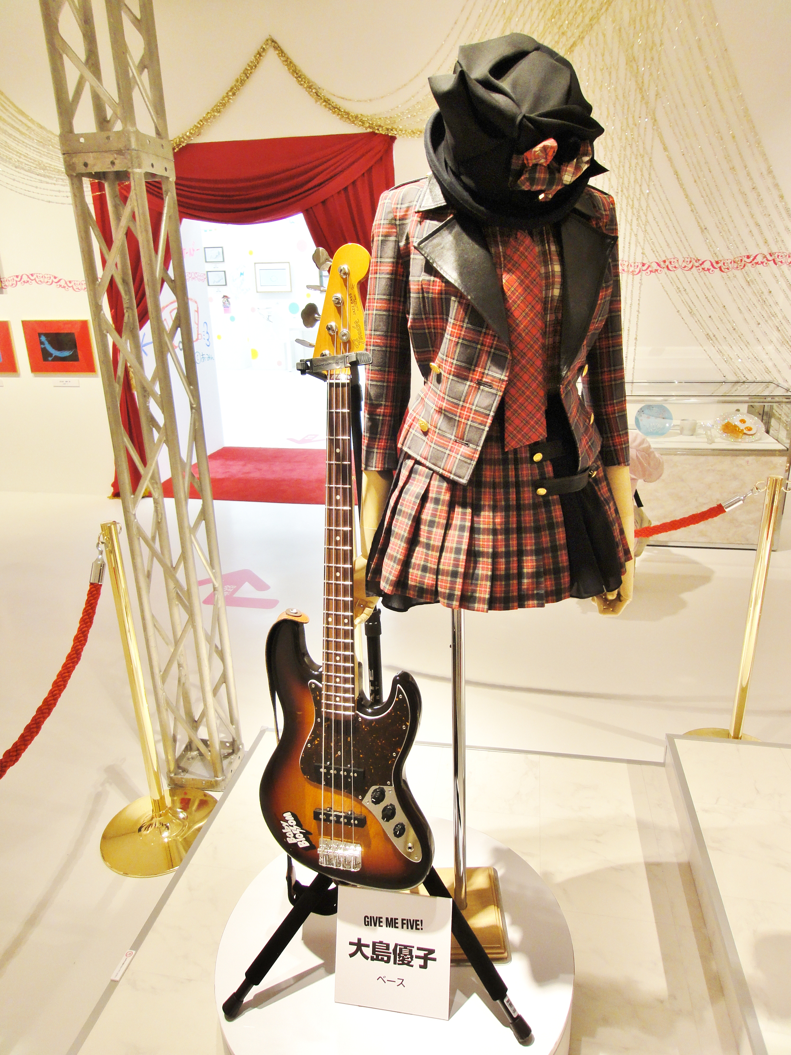 AKB48美術部展覧会 GIVE ME FIVE! 大島優子